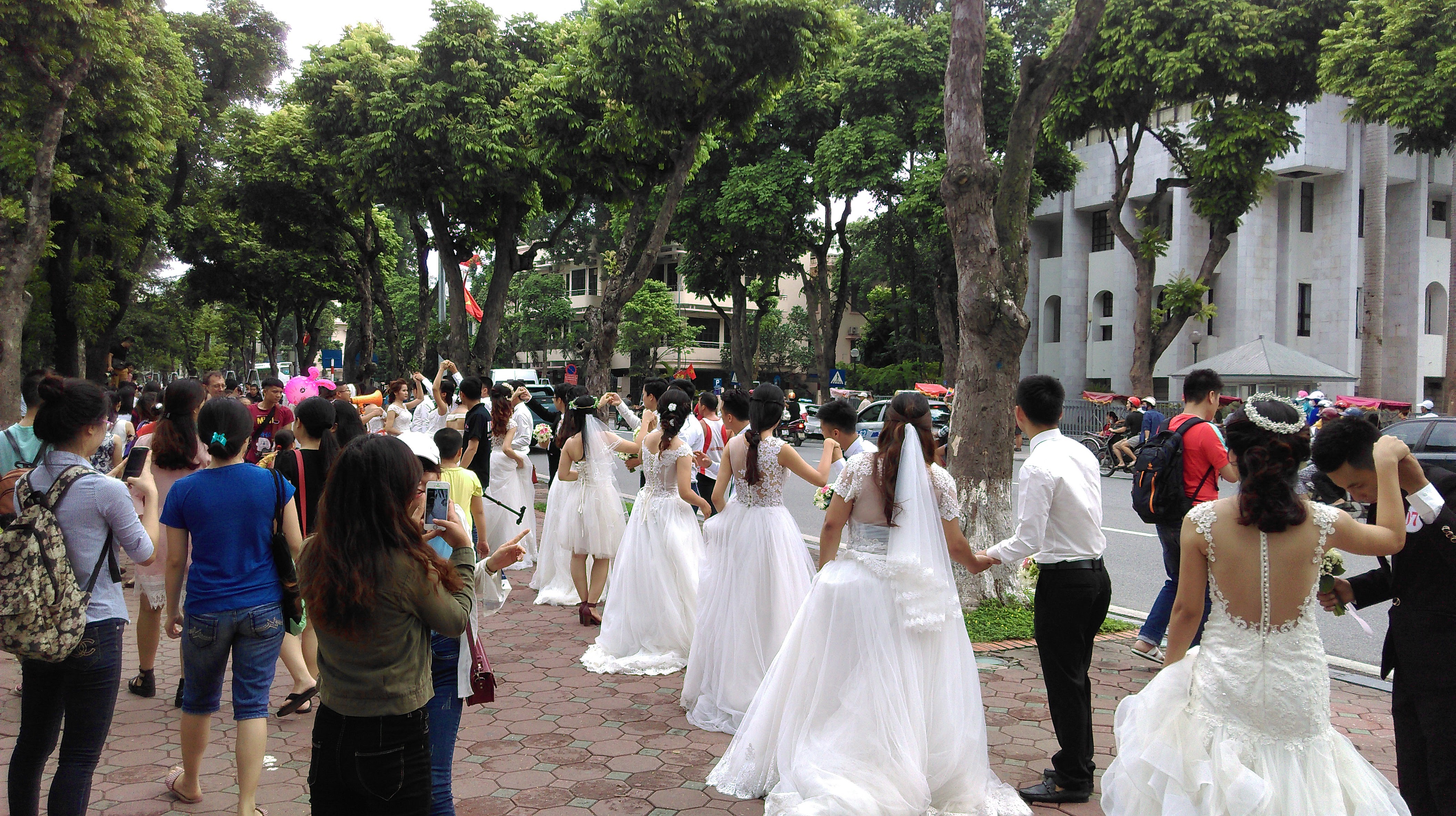 Đám cưới tập thể tại hồ Gươm, Hà Nội